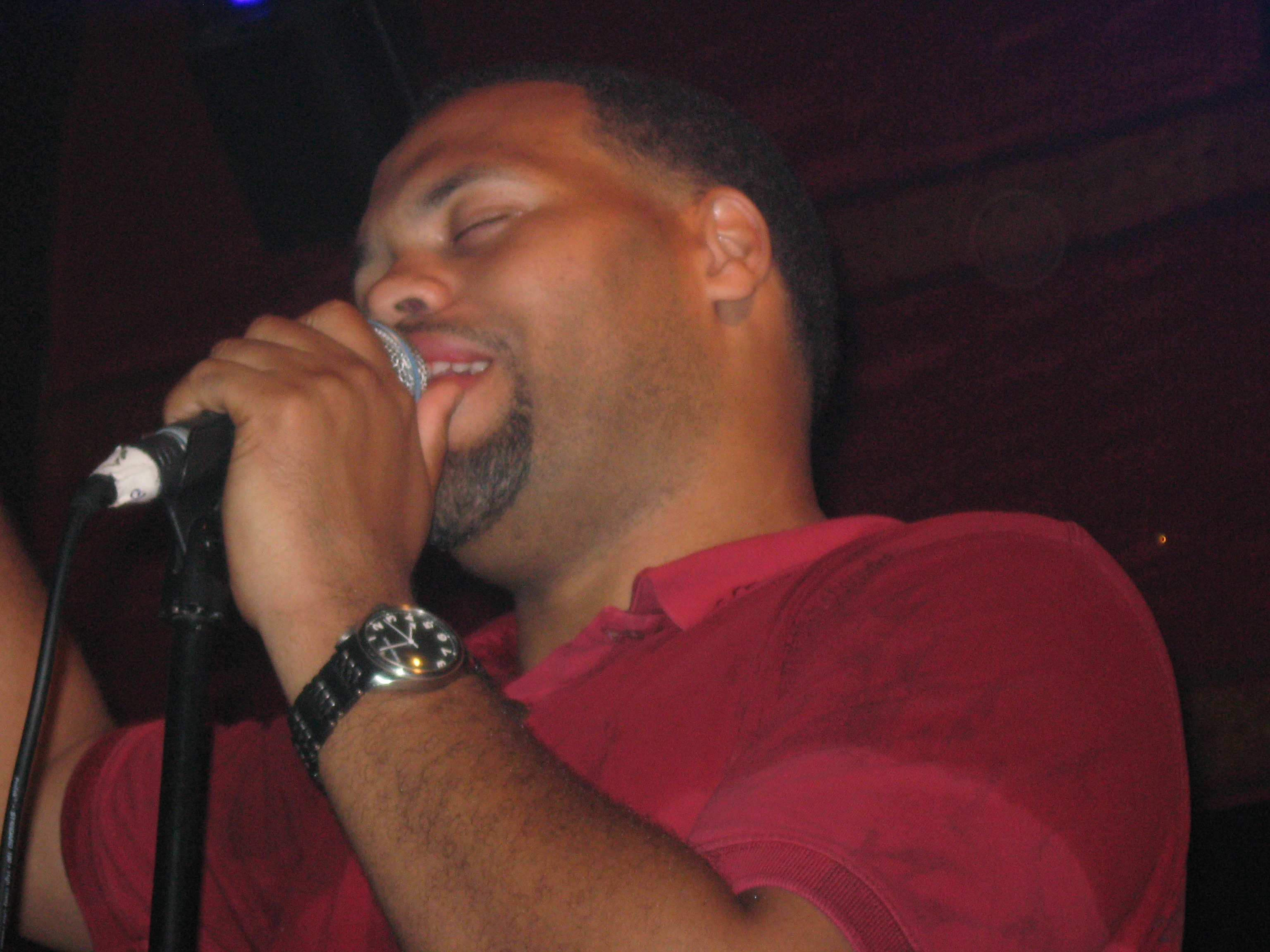 Eric Roberson